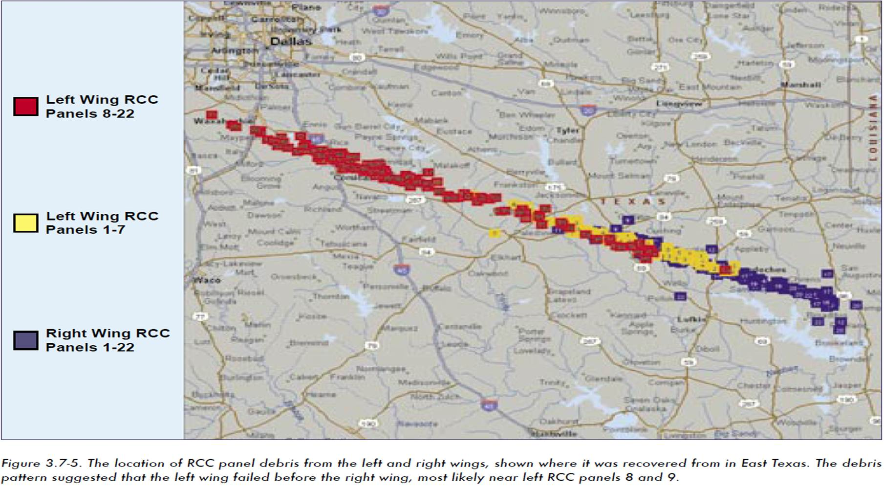 Localisation dans la partie est du Texas des débris provenant des ailes de la navette spatiale lors de la destruction de Columbia (STS-107). La localisation démontre que l'aile gauche s'est désagrégée a partir d'un brèche probablement située entre les panneaux 8 & 9 du bord d'attaque de l'aile.